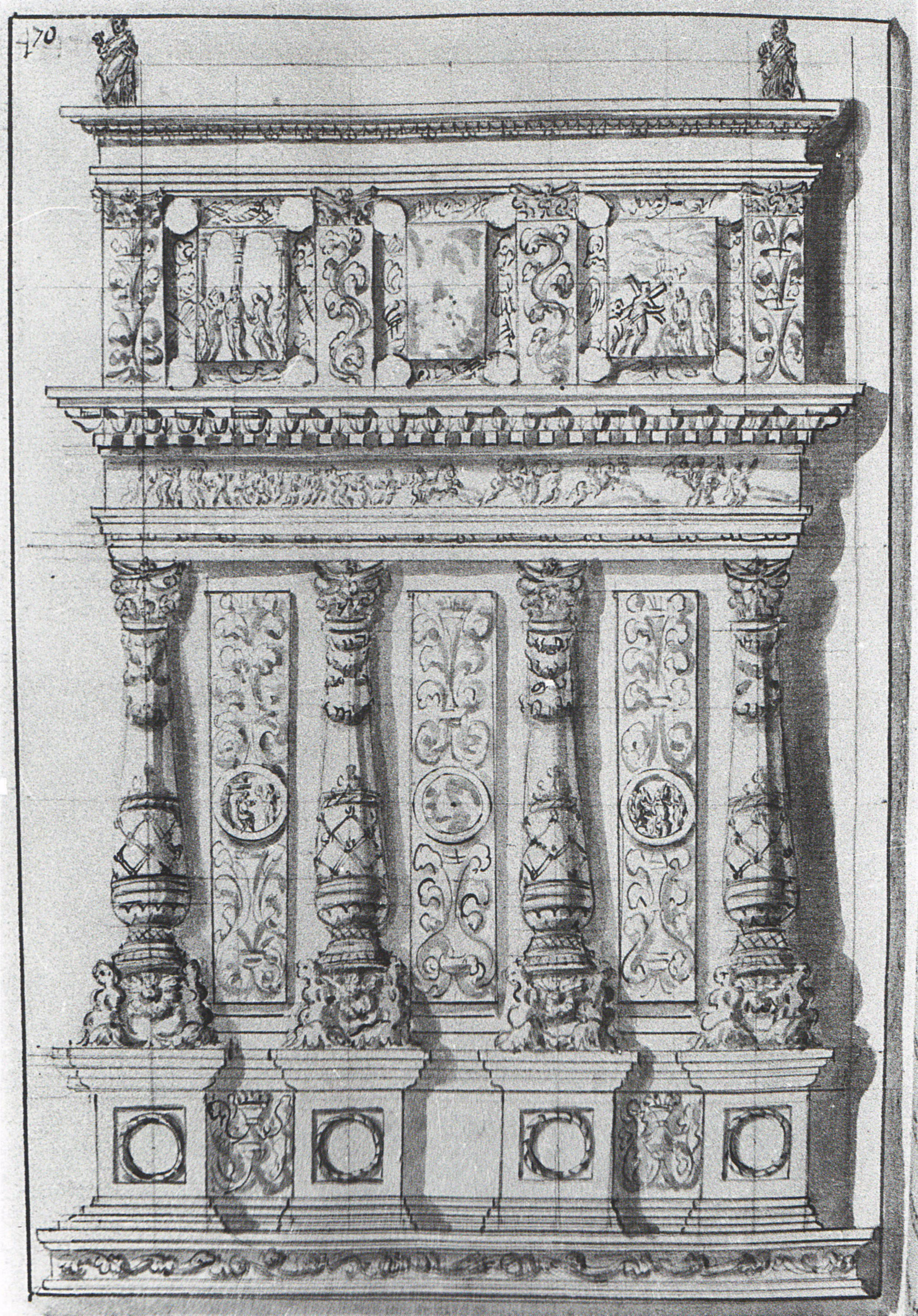 Mausoleo Martinengo (Gasparo Cairano, Bernardino Delle Croci, Brescia, museo di Santa Giulia) - Incisione 1668